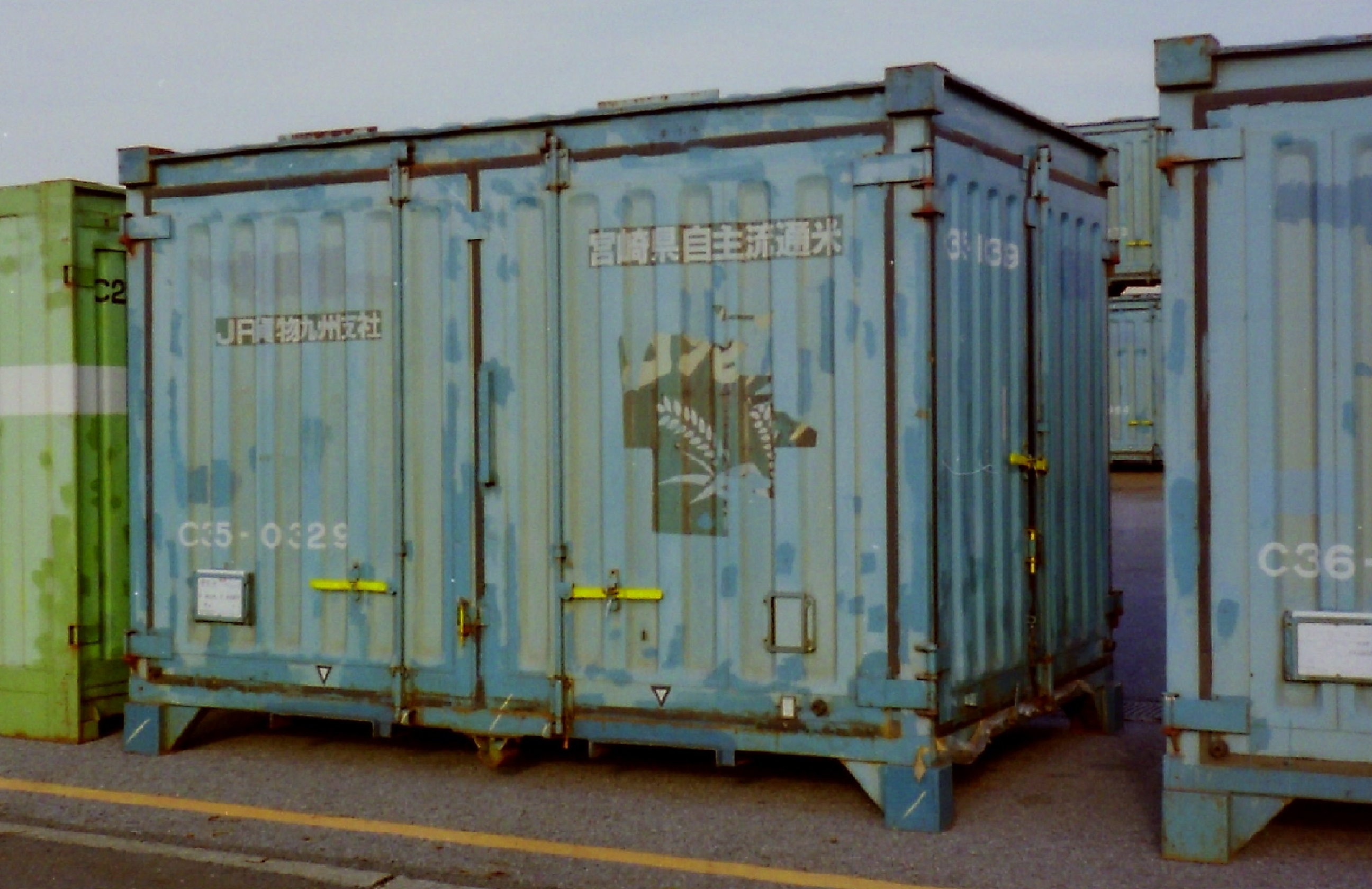 撮影地＝東京(タ)